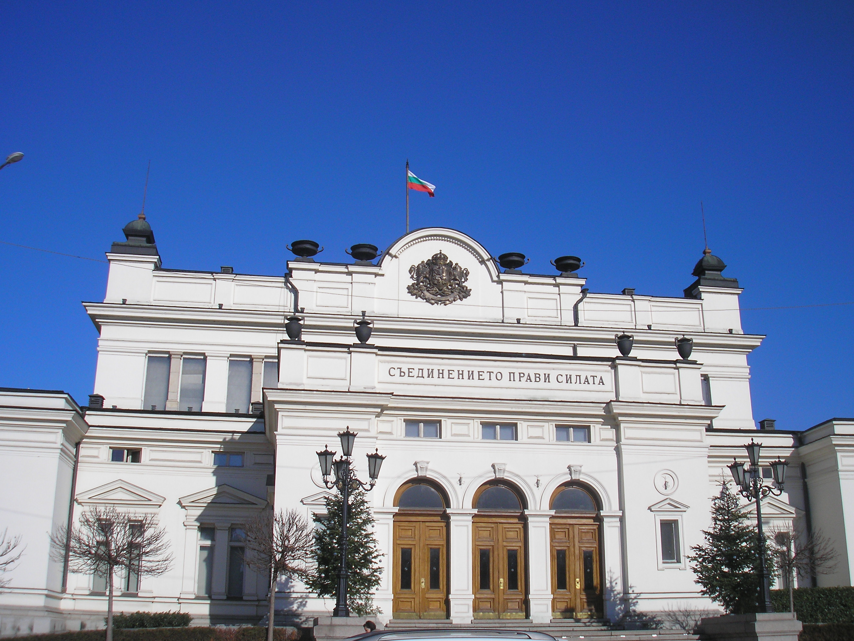 L'Assemblée Nationale